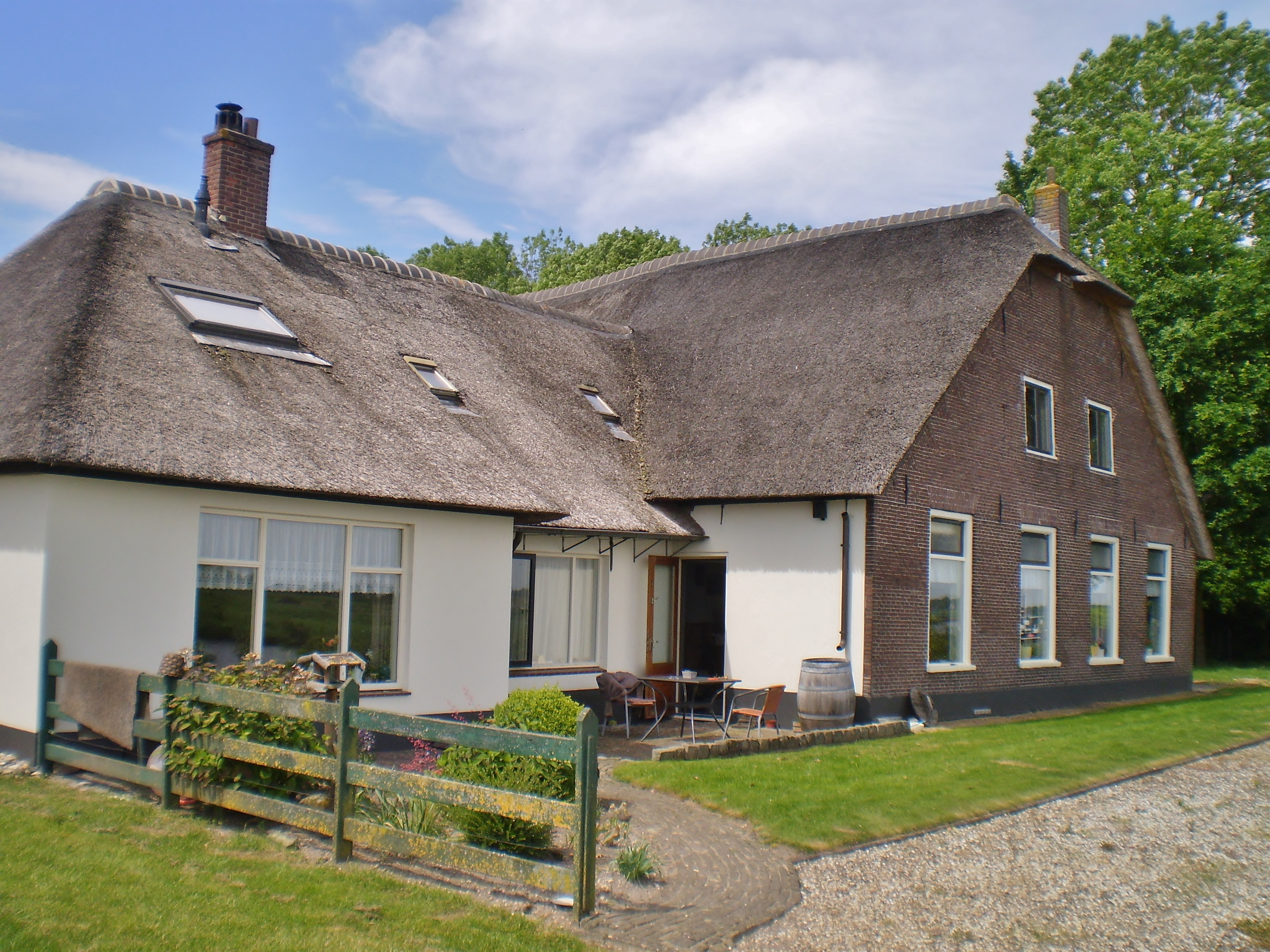 Grote Melmweg 10, voorzijde